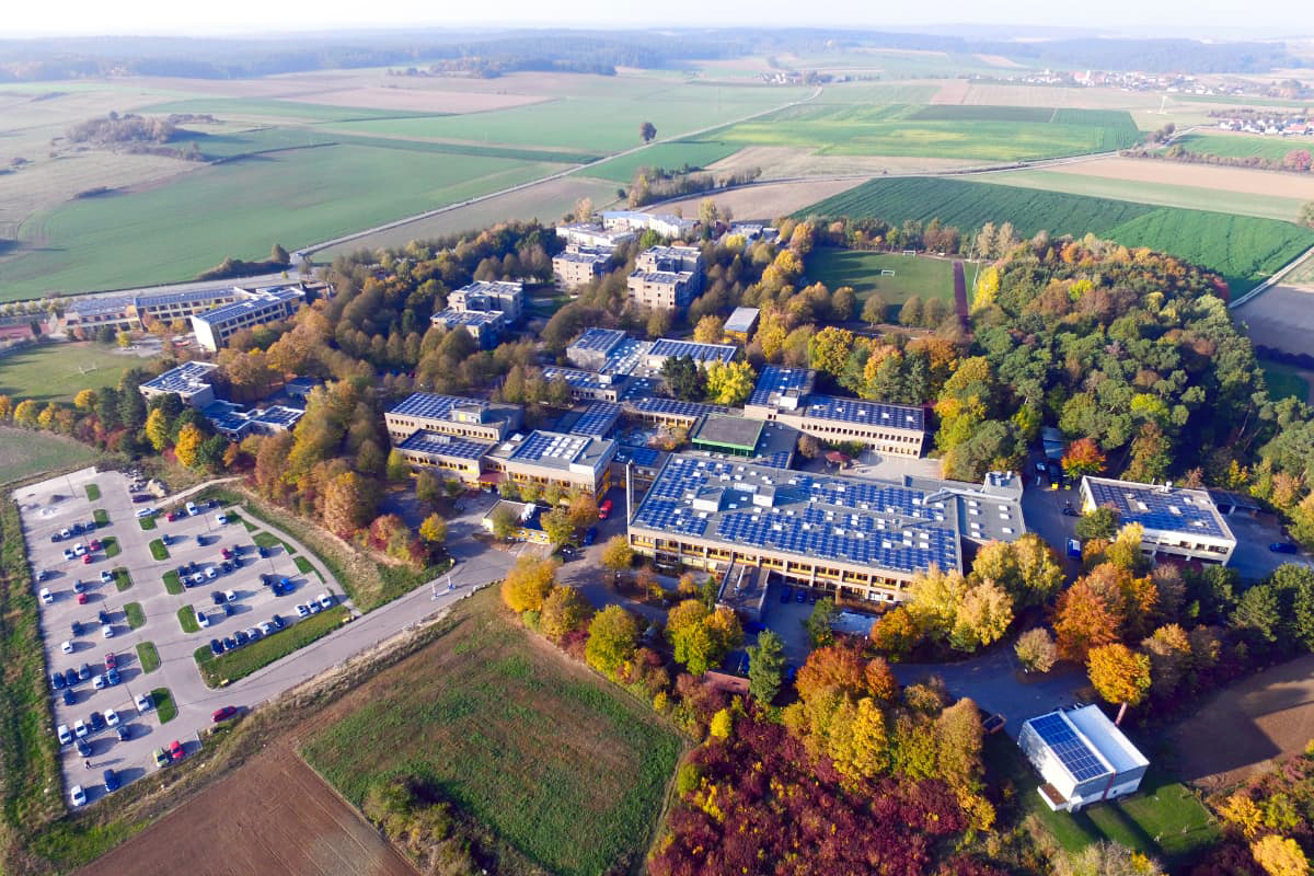 Luftbild vom Berufsbildungswerk Abensberg (2019)